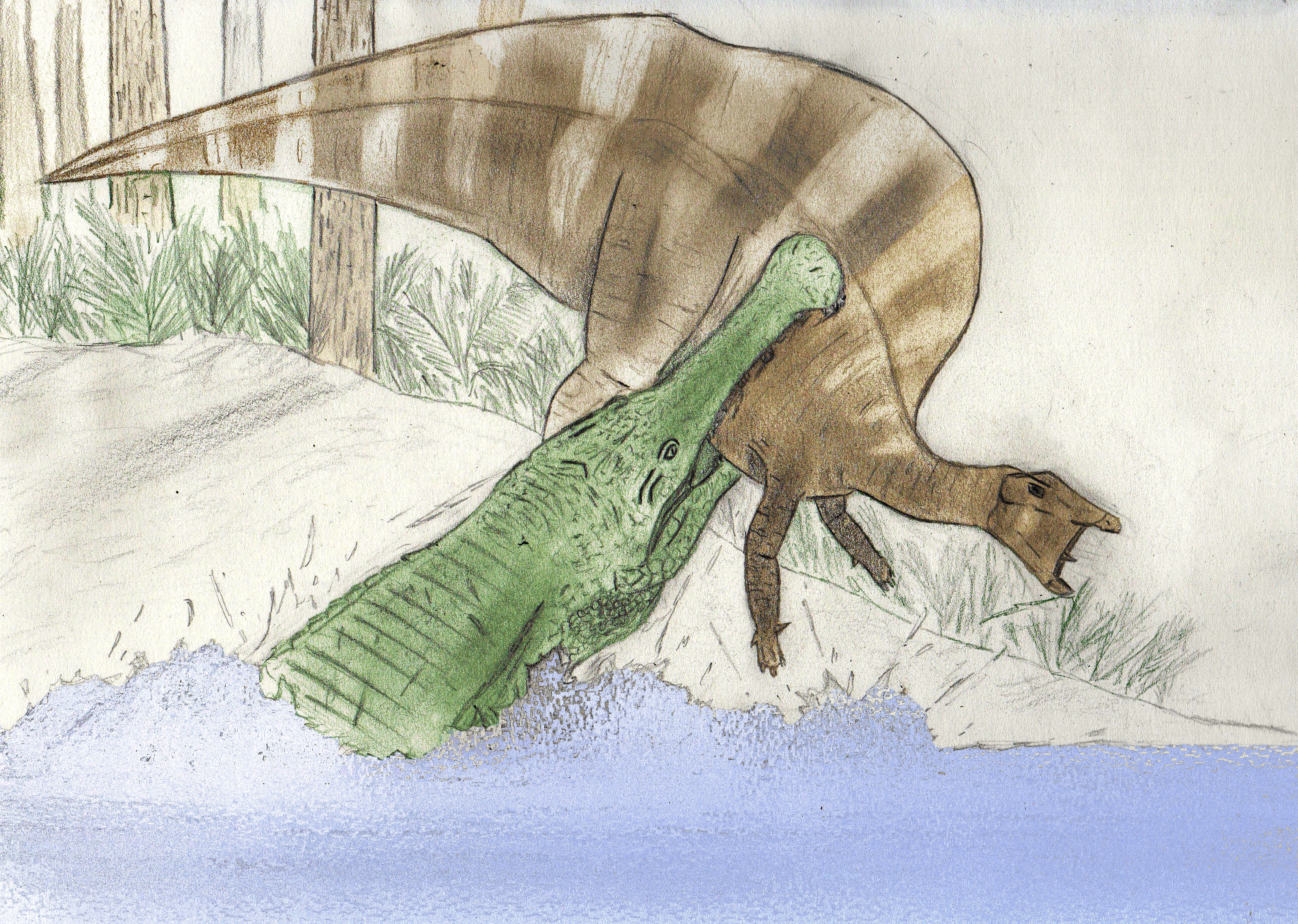 Sarcosuchus imperator et Ouranosaurus nigeriensis